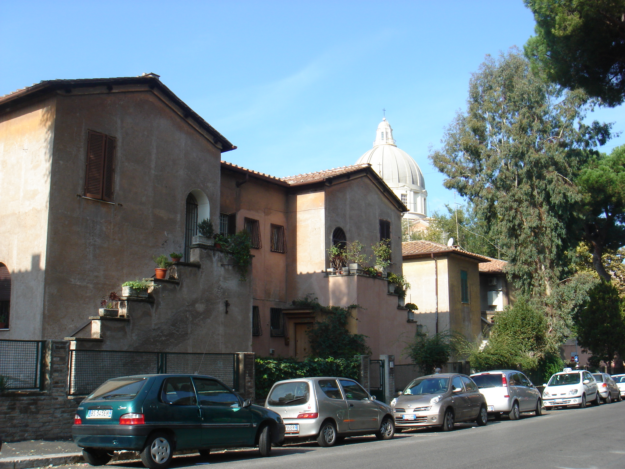 Roma, Garbatella: case